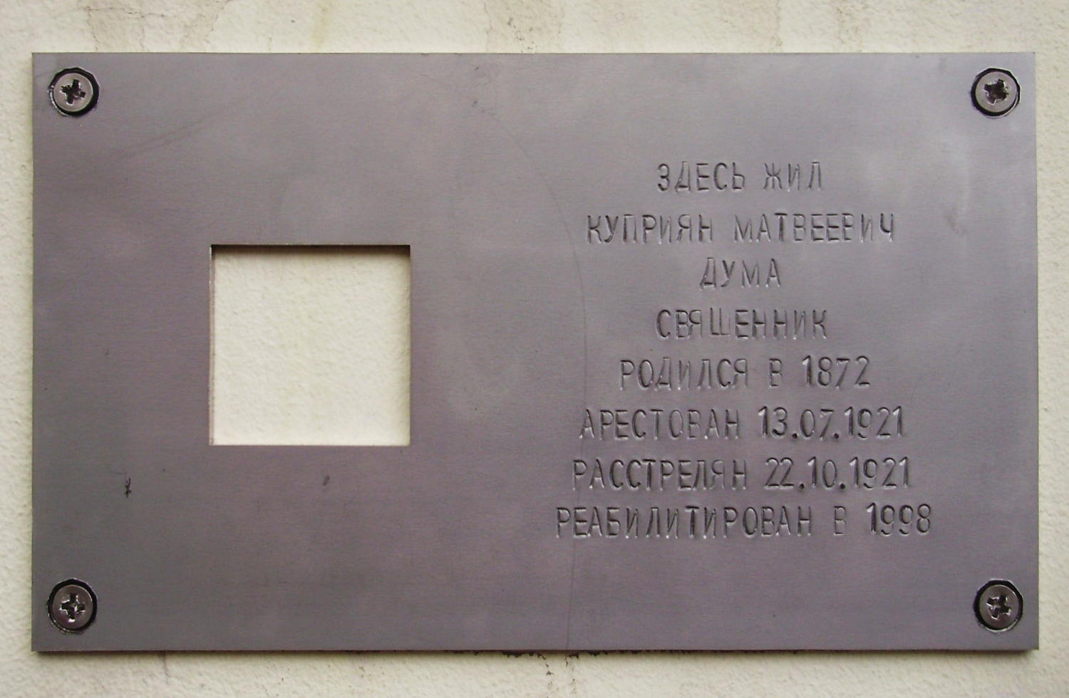 Ростов-на-Дону-Последний адрес (ул. Тургеневская 56) - собственно знак.